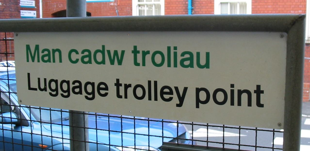 Frasevoorbeeld met naam en épithètes : man "plek" + cadw "oppas" + troliau "trollies" = "bagasietrolliepunt".